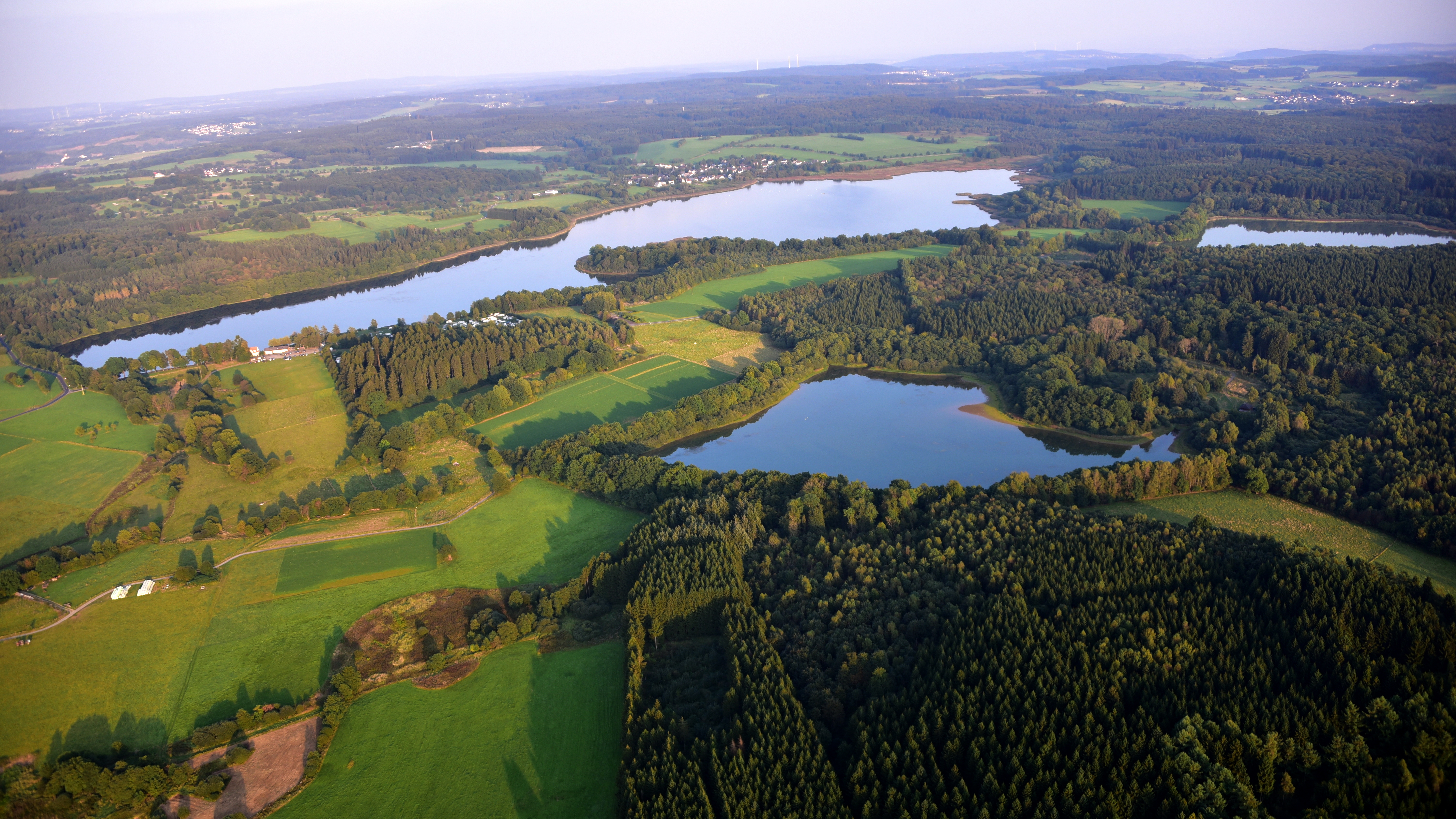 Blick über einen Teil der Westerwälder Seenplatte mit dem Dreifelder Weiher im Hintergrund (länglich), Hoffmannsweiher vorne und Haidenweiher am rechten Bildrand. Luftaufnahme (2016)